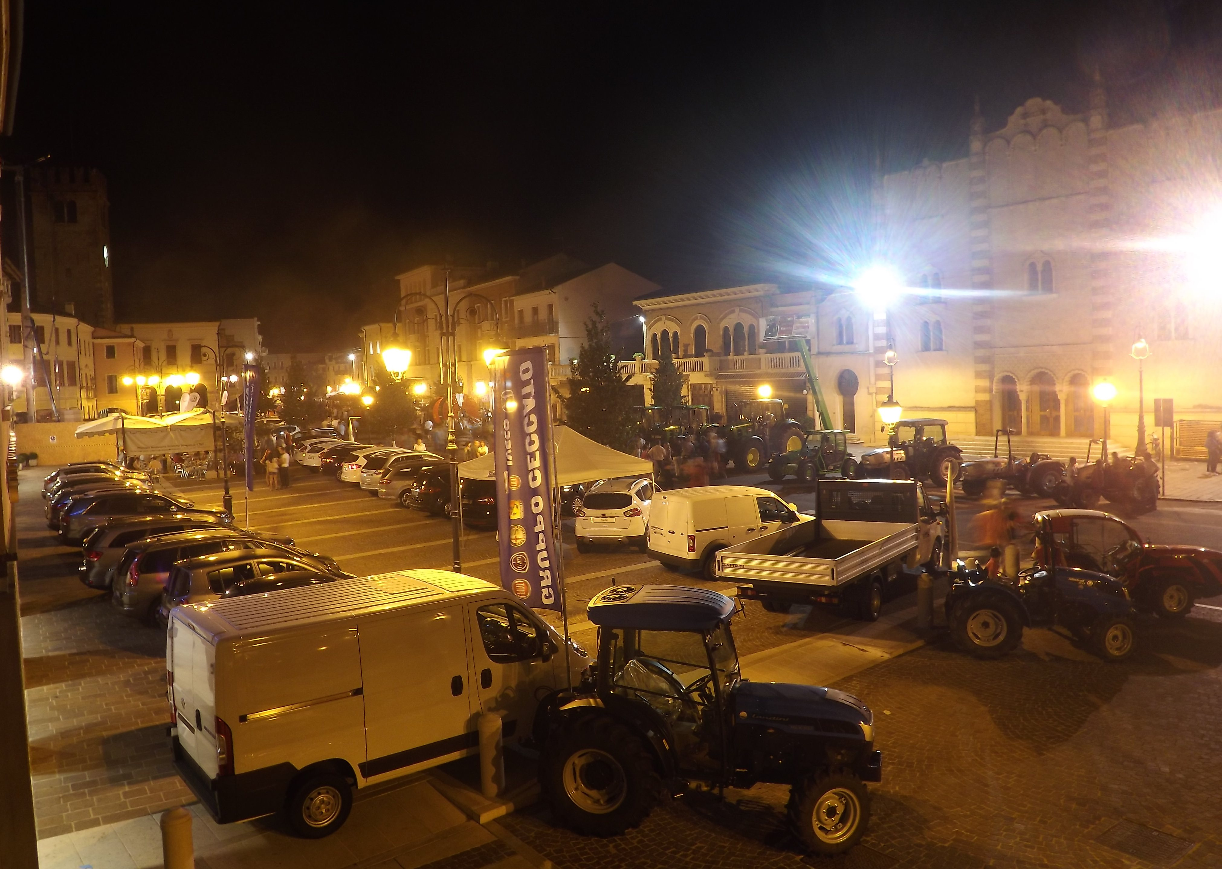 Fiera agricola di Cologna Veneta - Settembre 2011